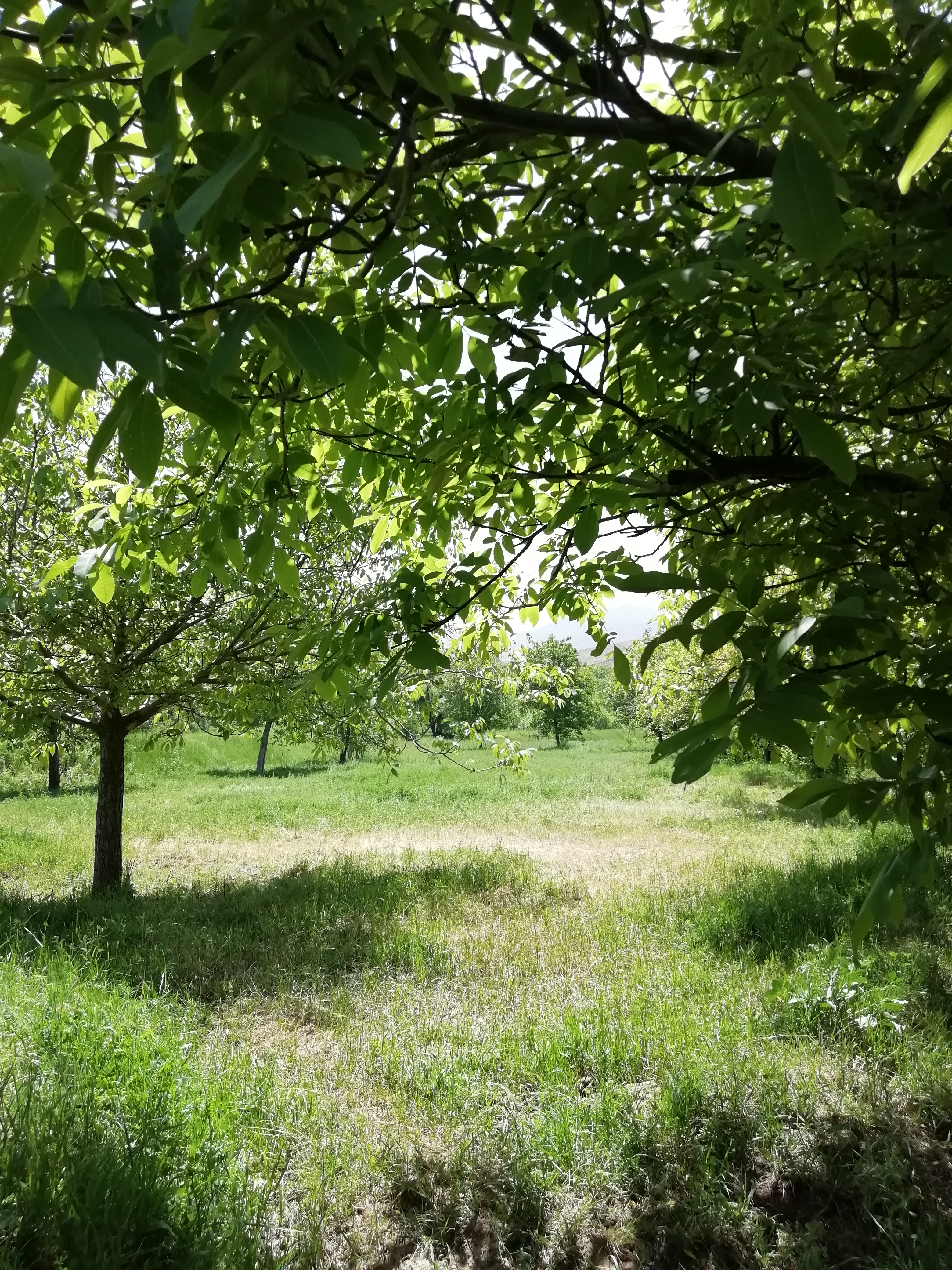 باغ های سرکان